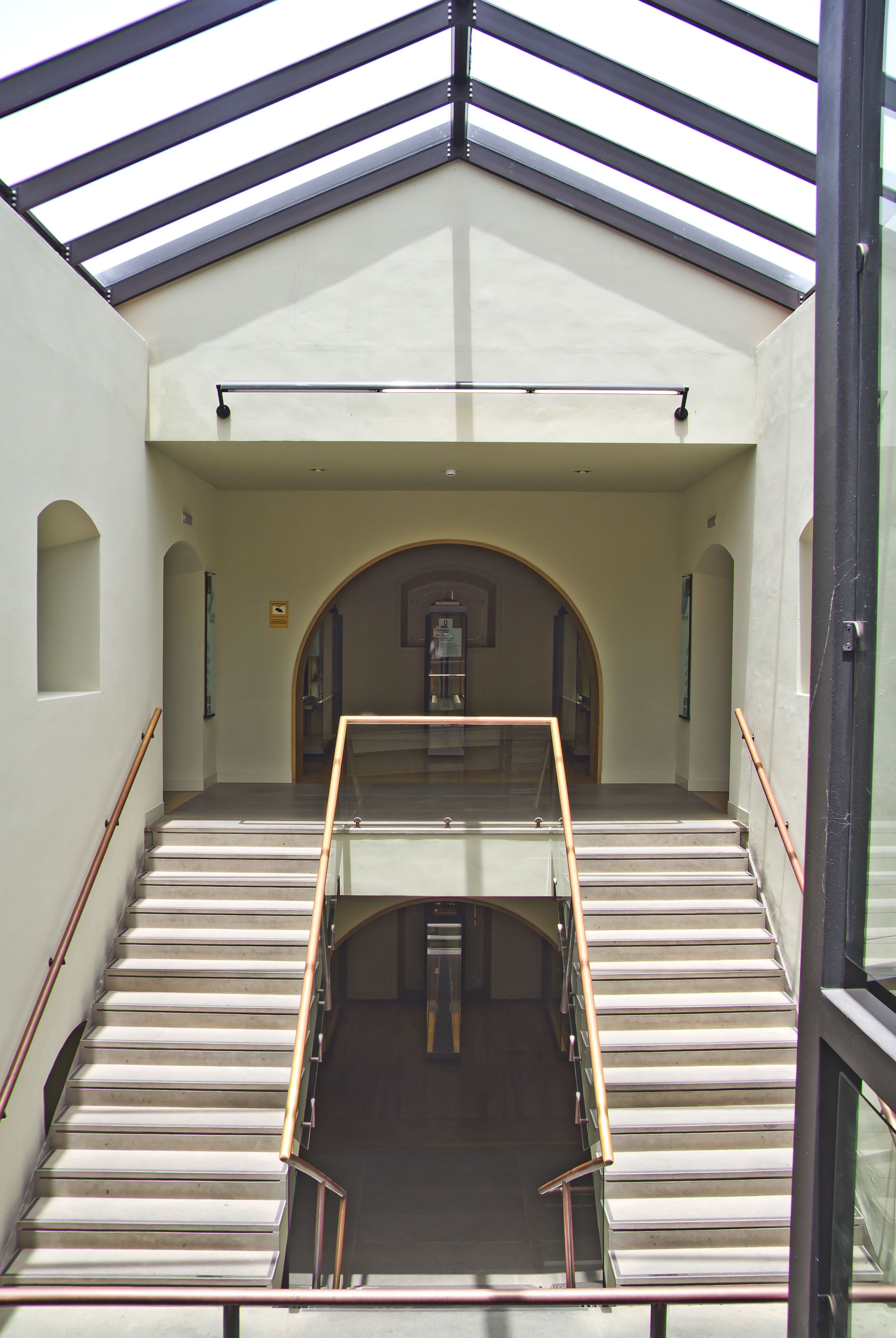 Treppenhaus im Antiguo Hospital Civil Santa Cruz de Tenerife (Museo de la Naturaleza y el Hombre)